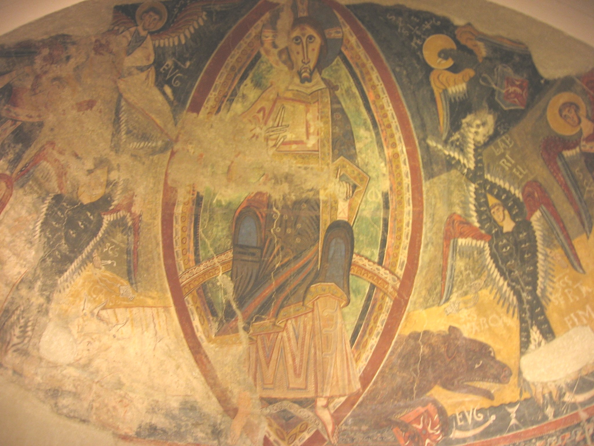 Pintures murals de Sant Pere d'Esterri de Cardós.